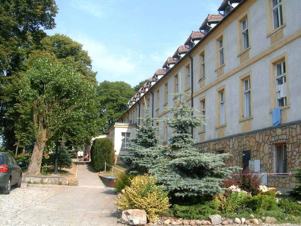 Trzęsacz - Zespół pałacowy